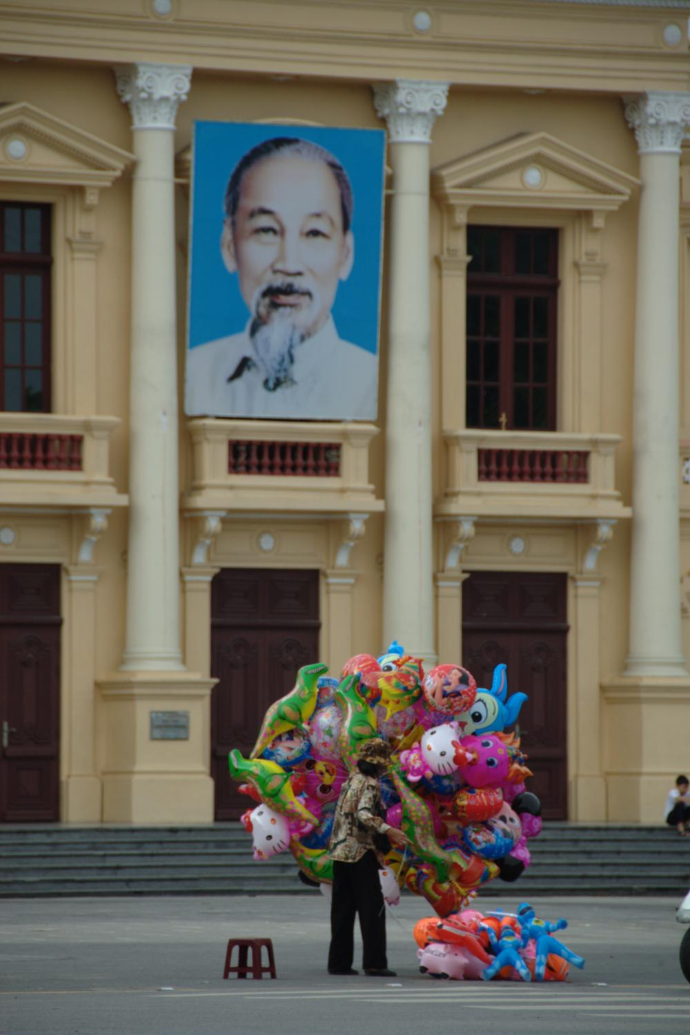 Haiphong, Vietnam.